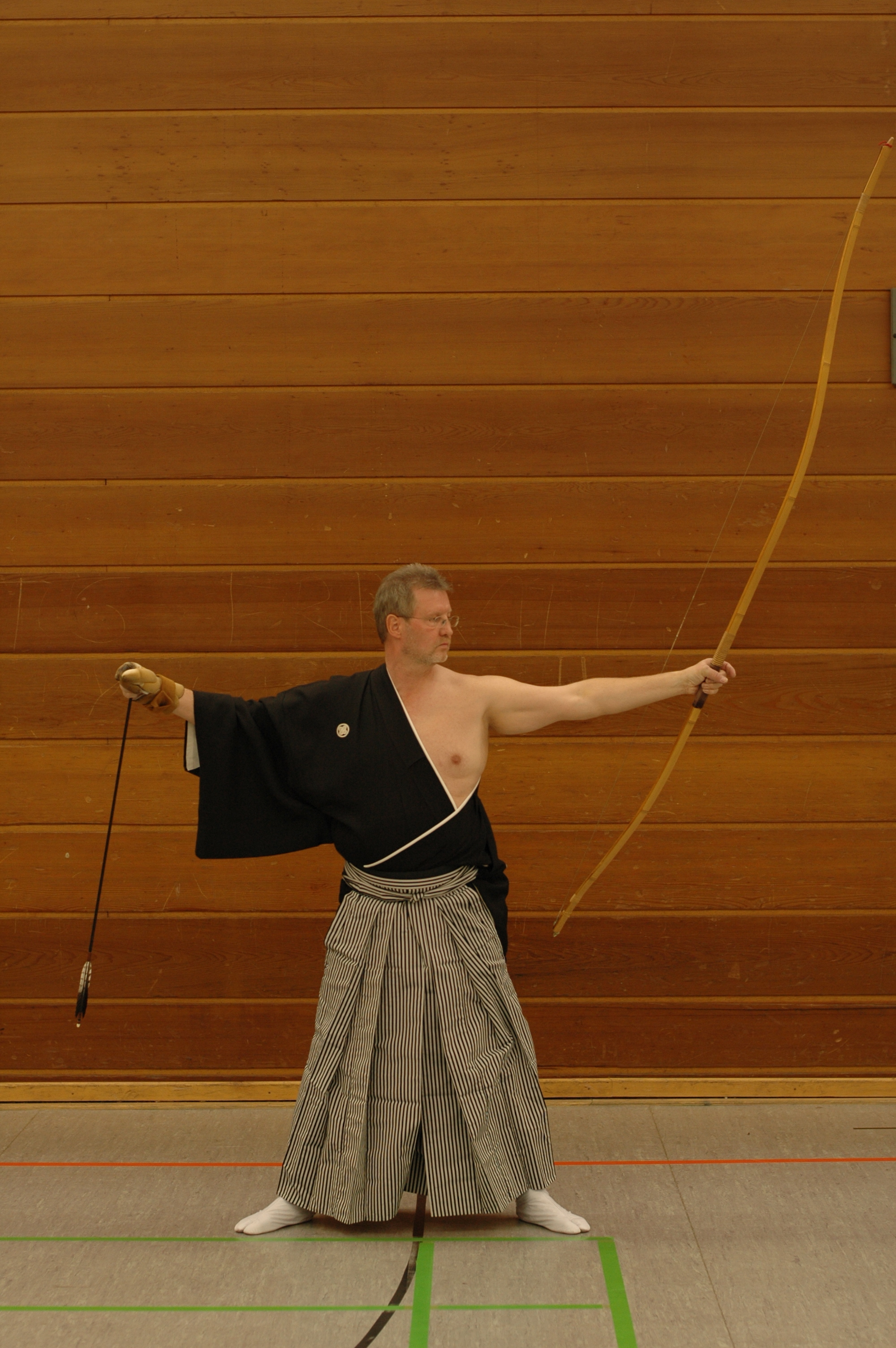 Nach dem Schuss / Zanshin: der Bogen dreht sich um die Längsachse, die Sehne schlägt außen am linken Unterarm an